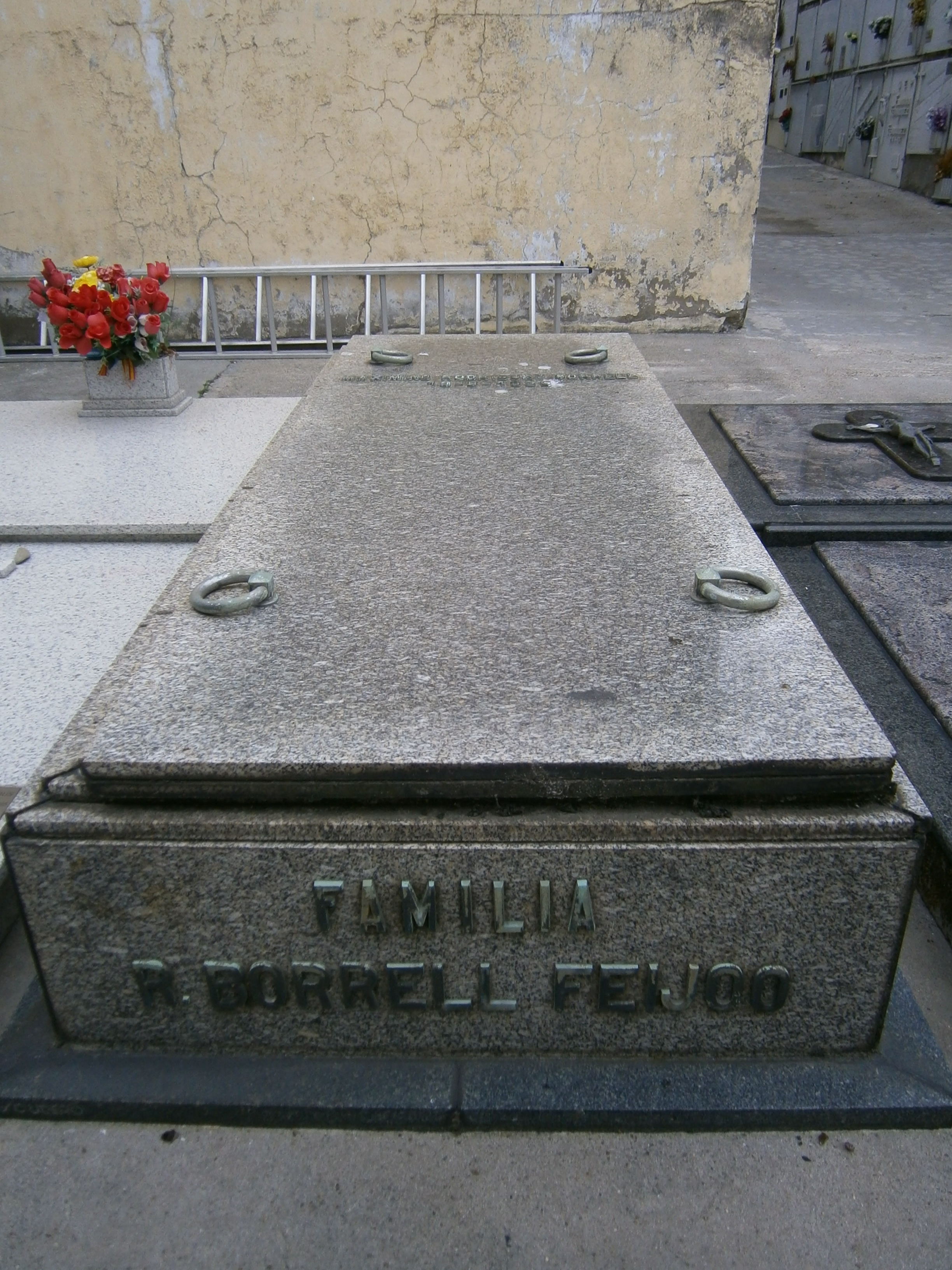 Tumba de Herminia Borrell Feijóo no cemiterio de Santo Amaro da Coruña